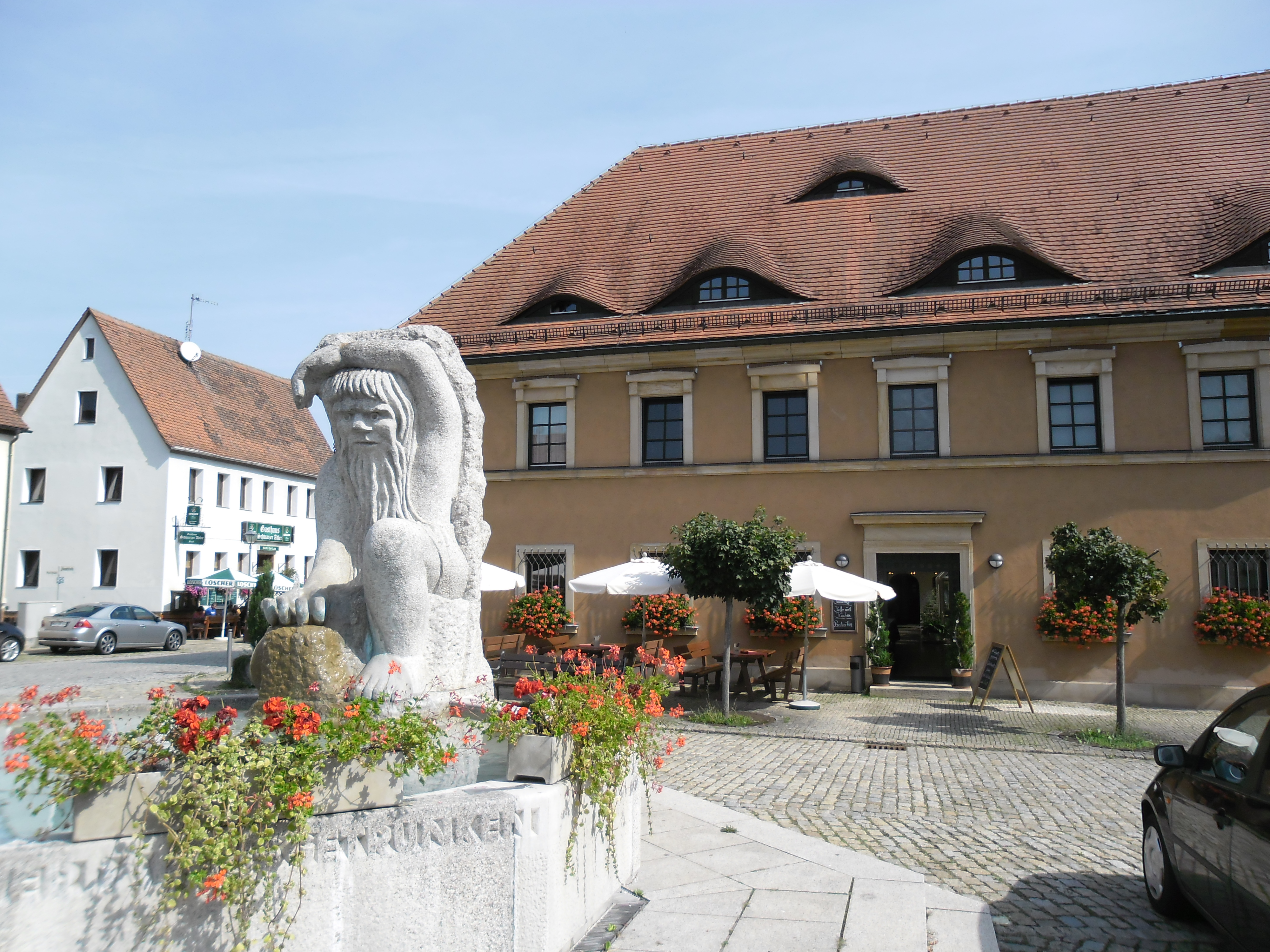 Nicht näher beschriebene Ansicht aus dem Bereich von Marktplatz und Hauptstraße des Ortes Neuhof an der Zenn in Mittelfranken